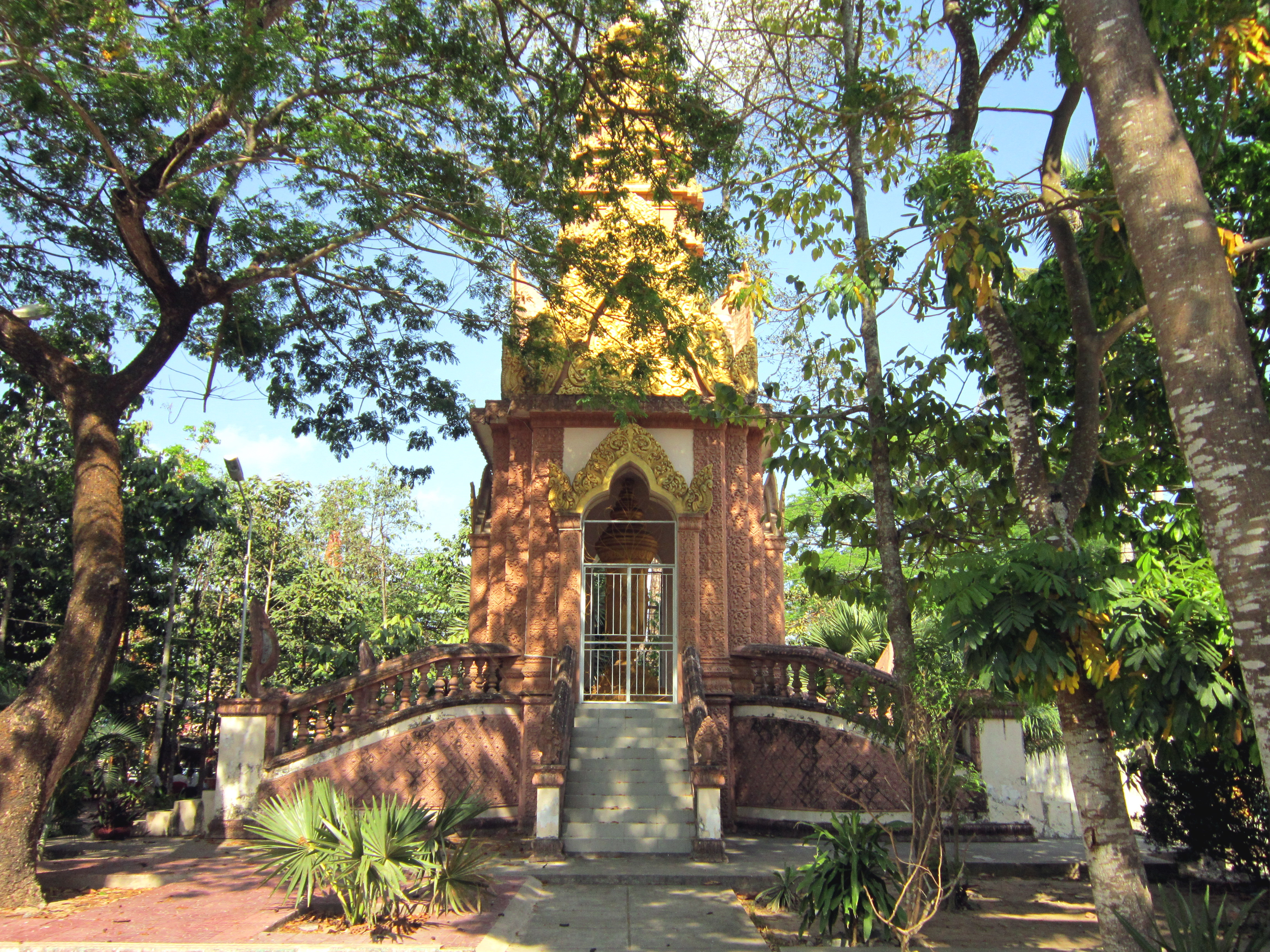 Tháp chùa chùa Khléang hiện tọa lạc tại thành phố Sóc Trăng, tỉnh Sóc Trăng, Việt Nam.